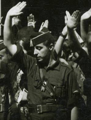 Fotografía del Jefe Territorial de la Falange Española Sancho Dávila y Fernández de Celis en Sevilla saludando desde el balcón de la casa cuartel de la calle Rioja. Sevilla, 29/09/1936